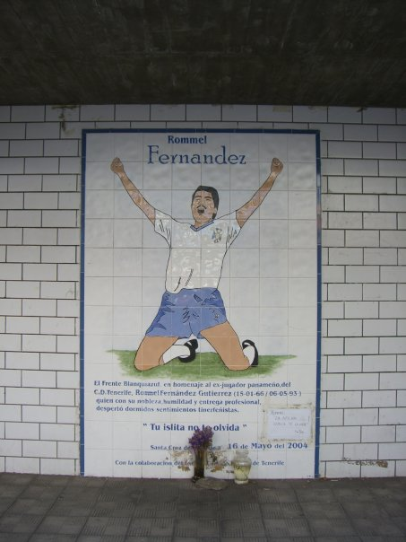 Homenaje a Rommel Fernandez en el Estadio Heliodoro Rodríguez